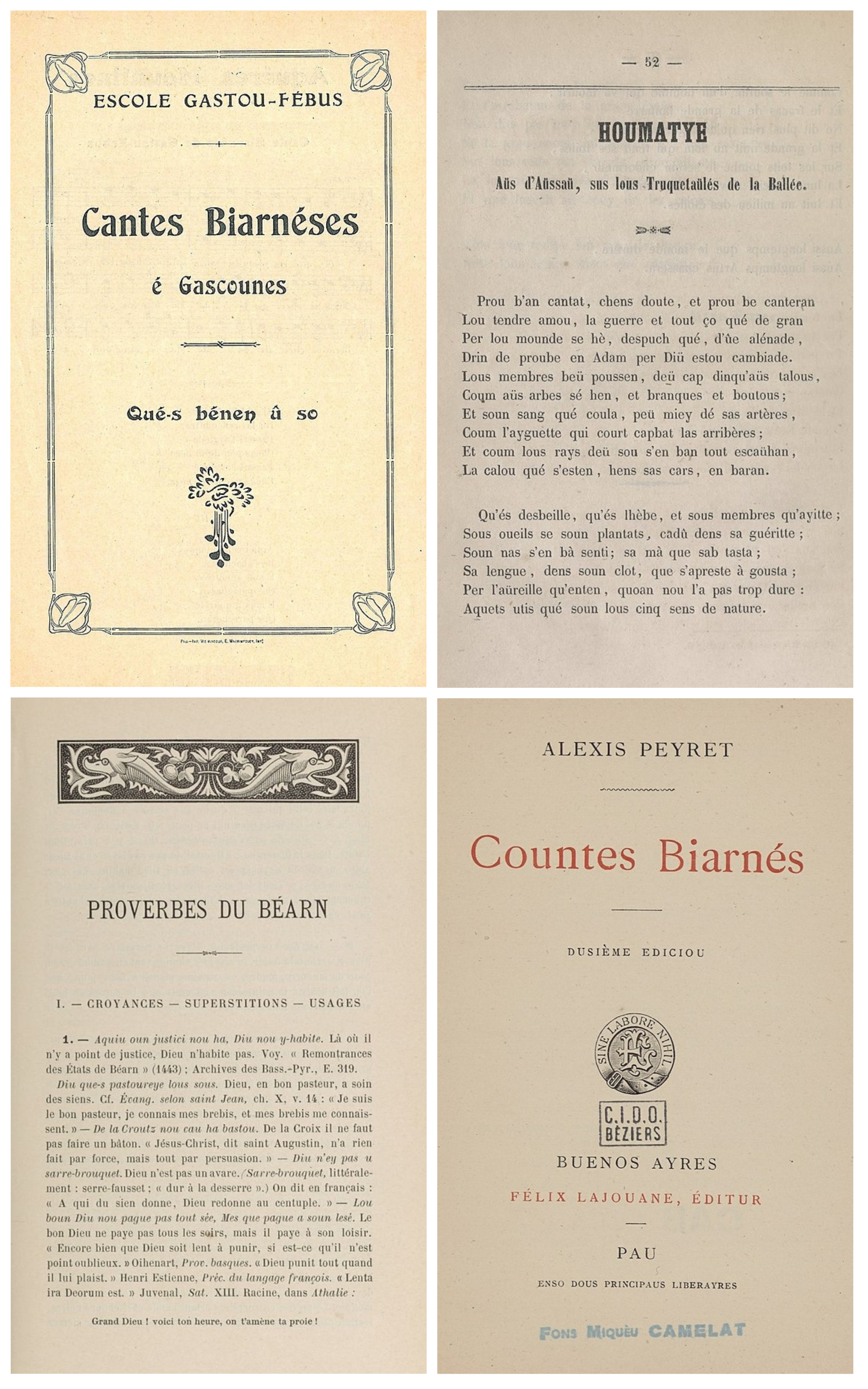 Montage de plusieurs ouvrages de littérature béarnaise, de haut en bas et de gauche à droite : Cantes Biarnéses.jpg par Escole Gastou Febus. Houmatye.jpg par Théophile de Bordeu. Proverbes Béarn.jpg par Vastin Lespy. Countes biarnès.jpg par Alexis Peyret.